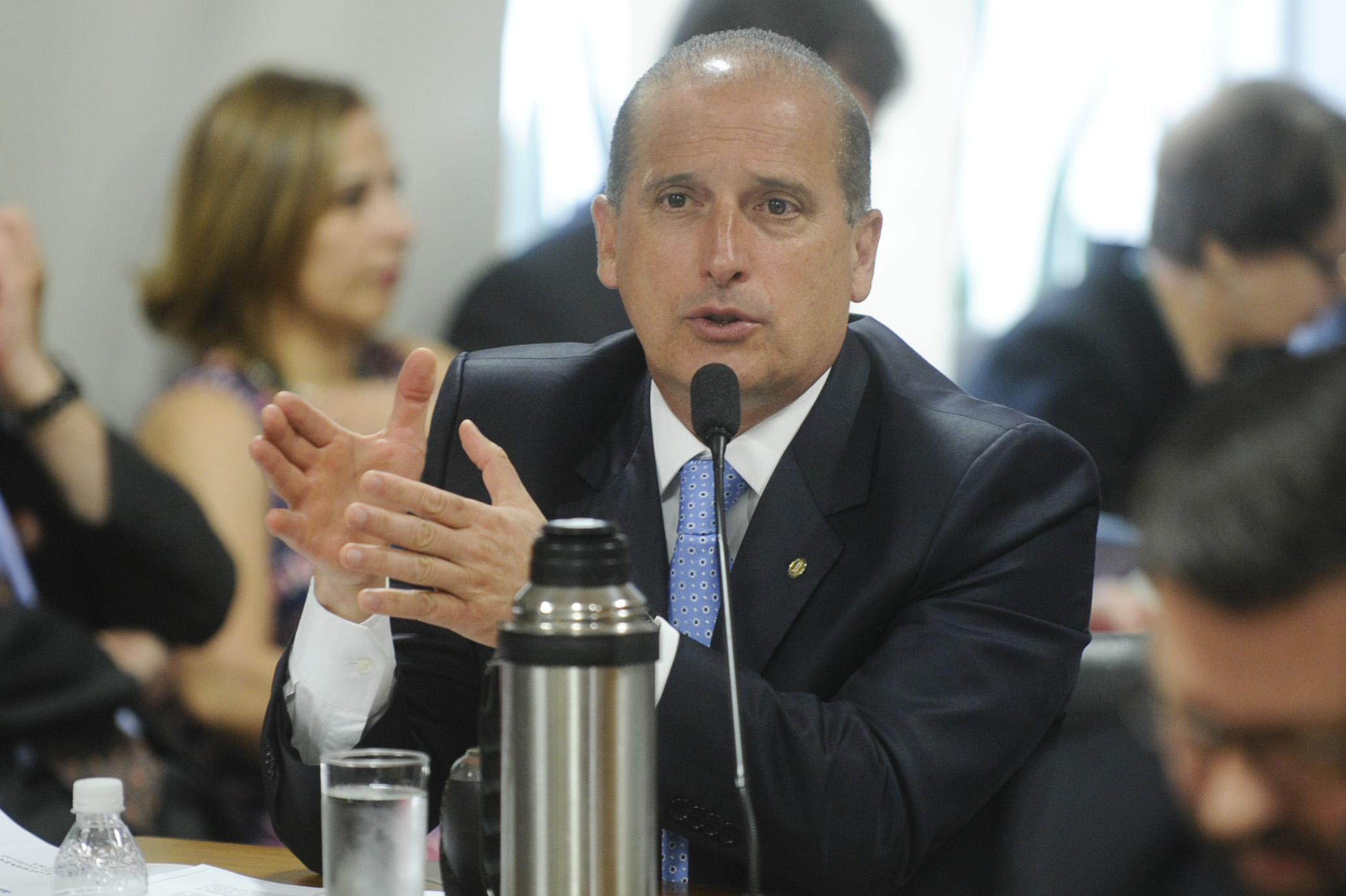 Sala de comissões do Senado Federal durante depoimento do sócio de empresa investigada pela Operação Lava Jato. A CPI mista da Petrobras marcou para a manhã de quinta-feira (27) o depoimento diretor da empresa Sanko-Sider, Márcio Bonilho. A expectativa é que Bonilho explique quais as relações que mantém ou mantinha com o doleiro Alberto Youssef e com o ex-diretor da Petrobras, Paulo Roberto Costa. Em pronunciametno, deputado Onyx Lorenzoni (DEM-RS). Foto: Marcos Oliveira/Agência Senado